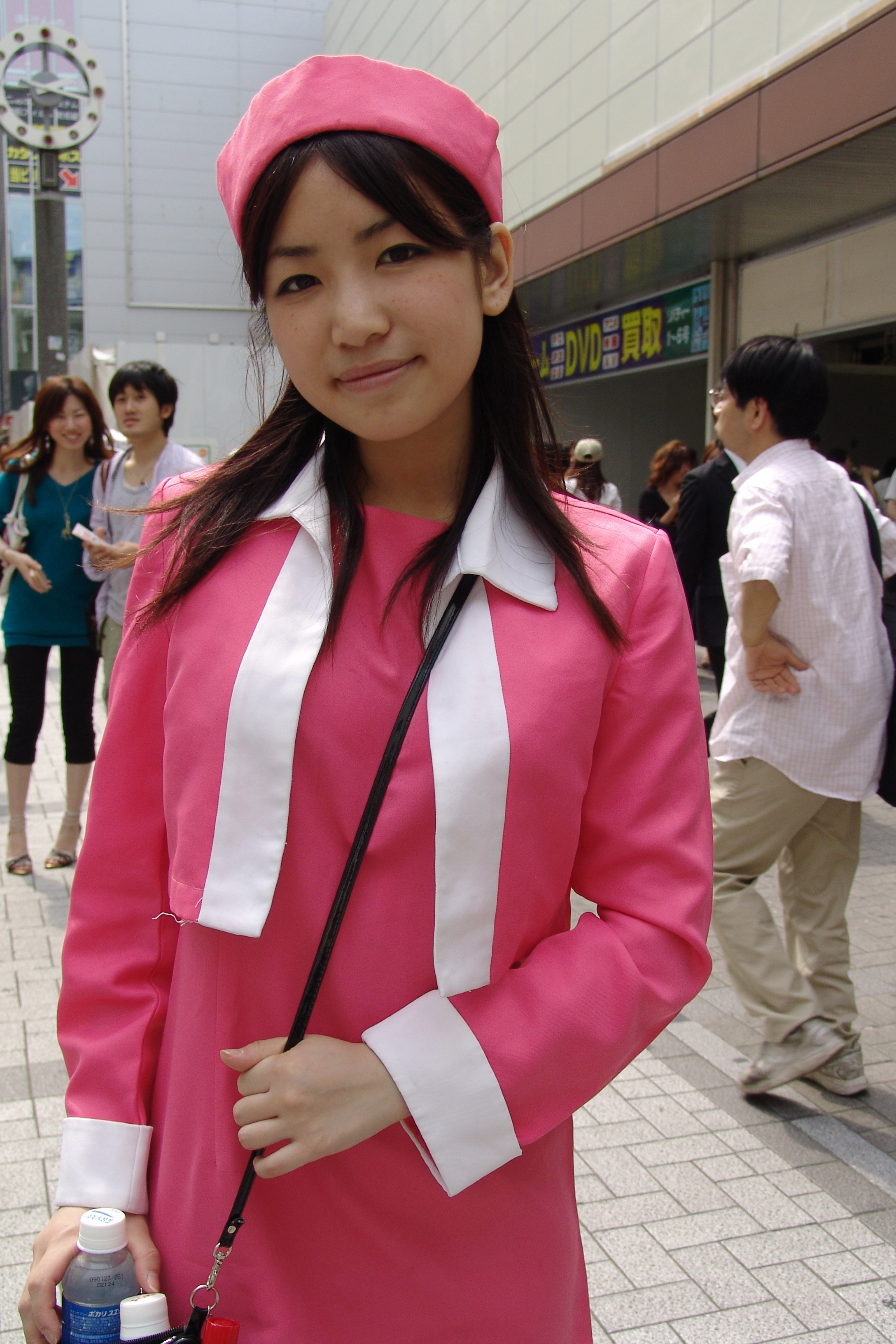 片瀬有希(現 大崎由希)さん、というらしい。エレガールズというグループと一緒に活動しているインディーズ・アイドルだとか。